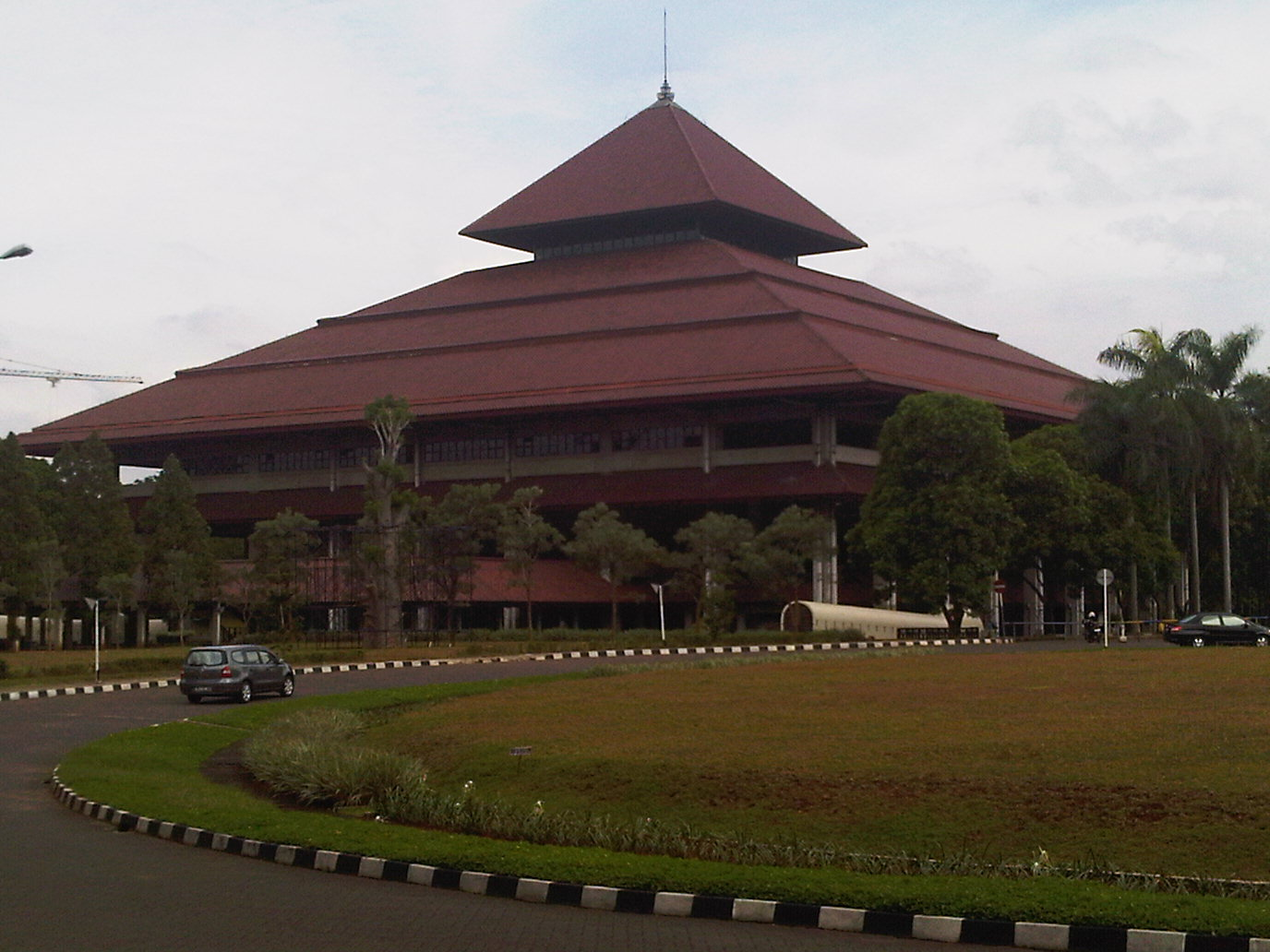 Balairung Universitas Indonesia - auditorium